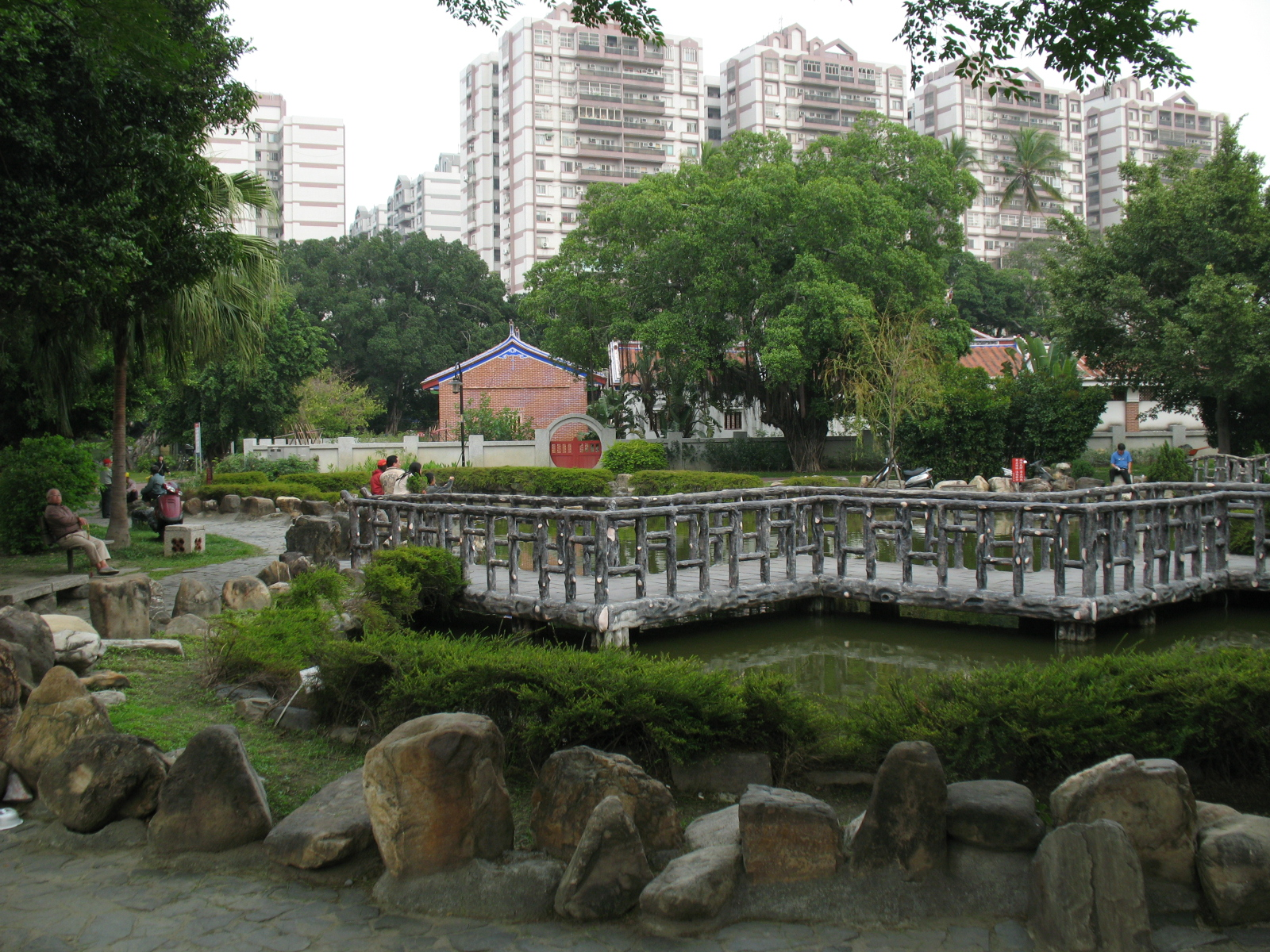 員林公園園區一景，中間傳統建築為興賢書院，後方大樓為員林國宅。